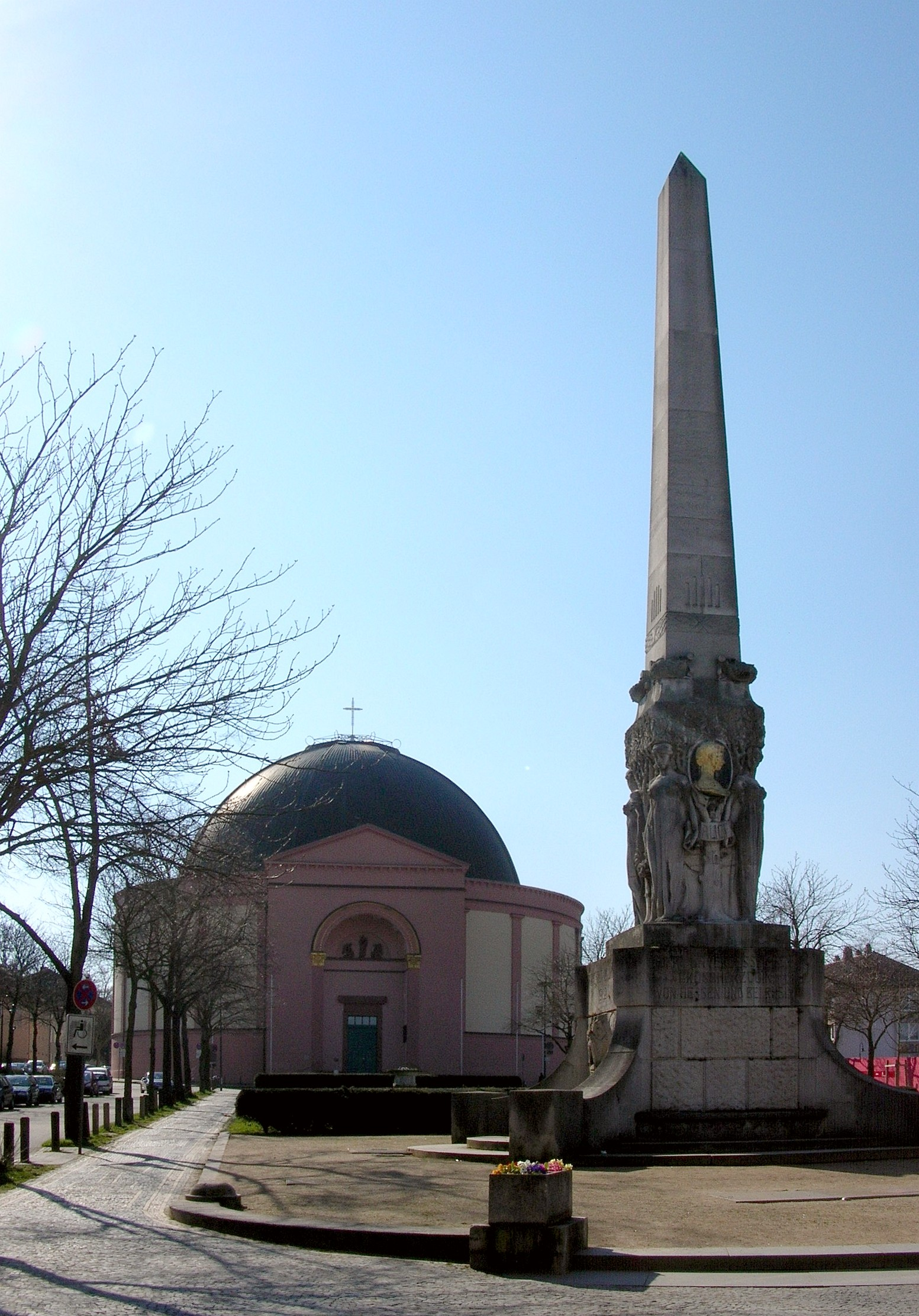 Darmstadt, kath. Kirche St. Ludwig, Obelisk